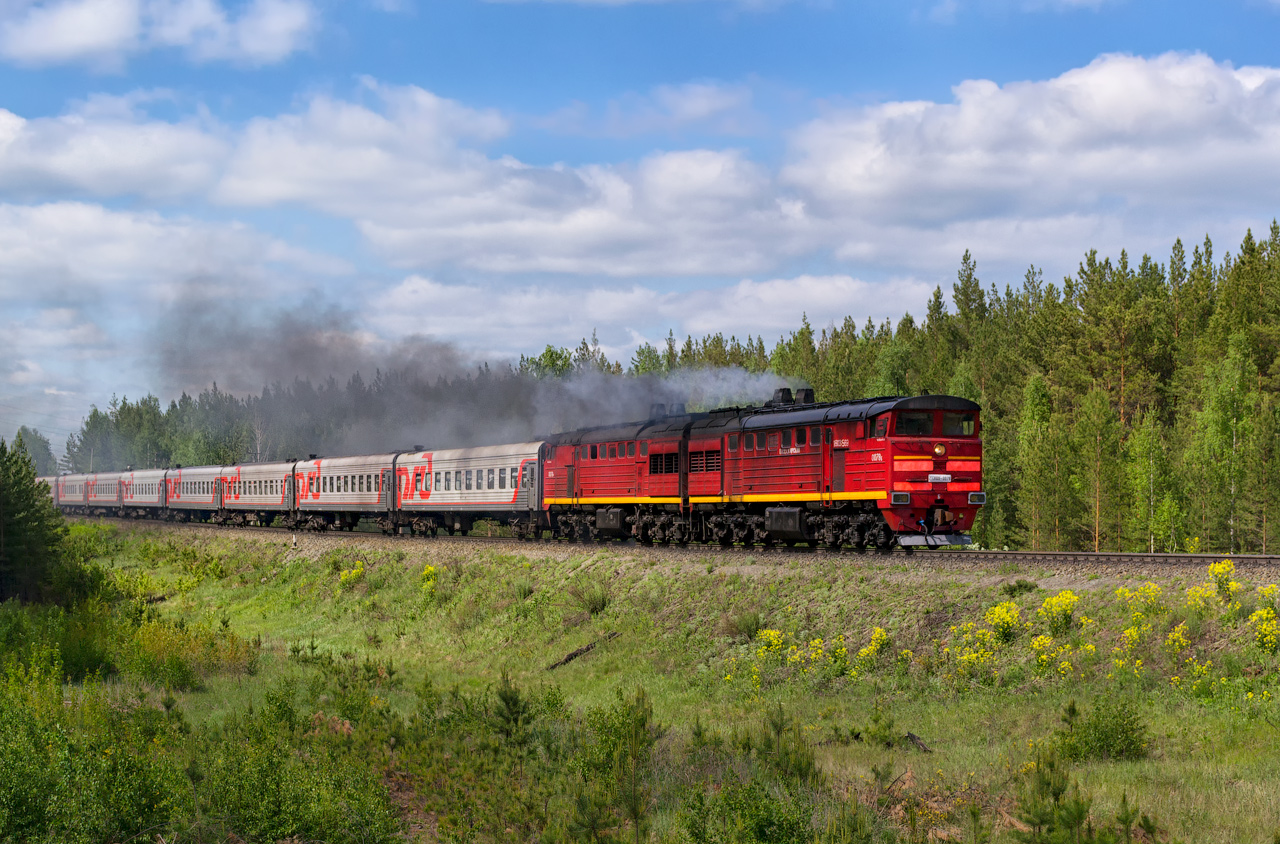 11.02.2017 — столкновение на переезде с автомобилем "Камаз" на участке Аргаяш — Ишалино. Пострадала секция "Б" 05.2017 — КР Уссурийский ЛРЗ